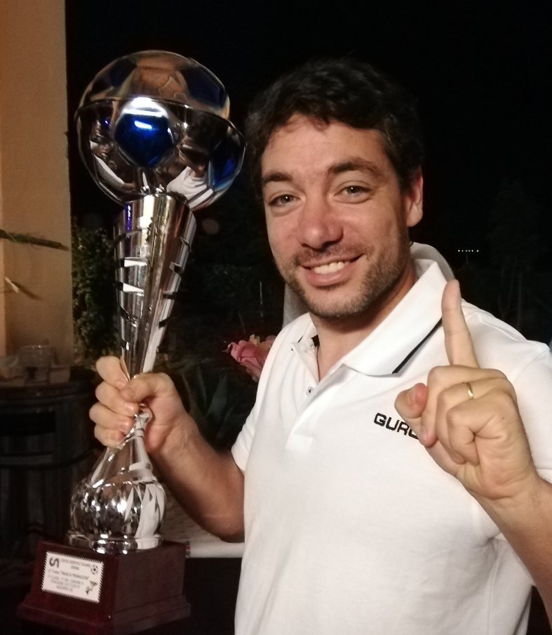 Mister Rodrigo García